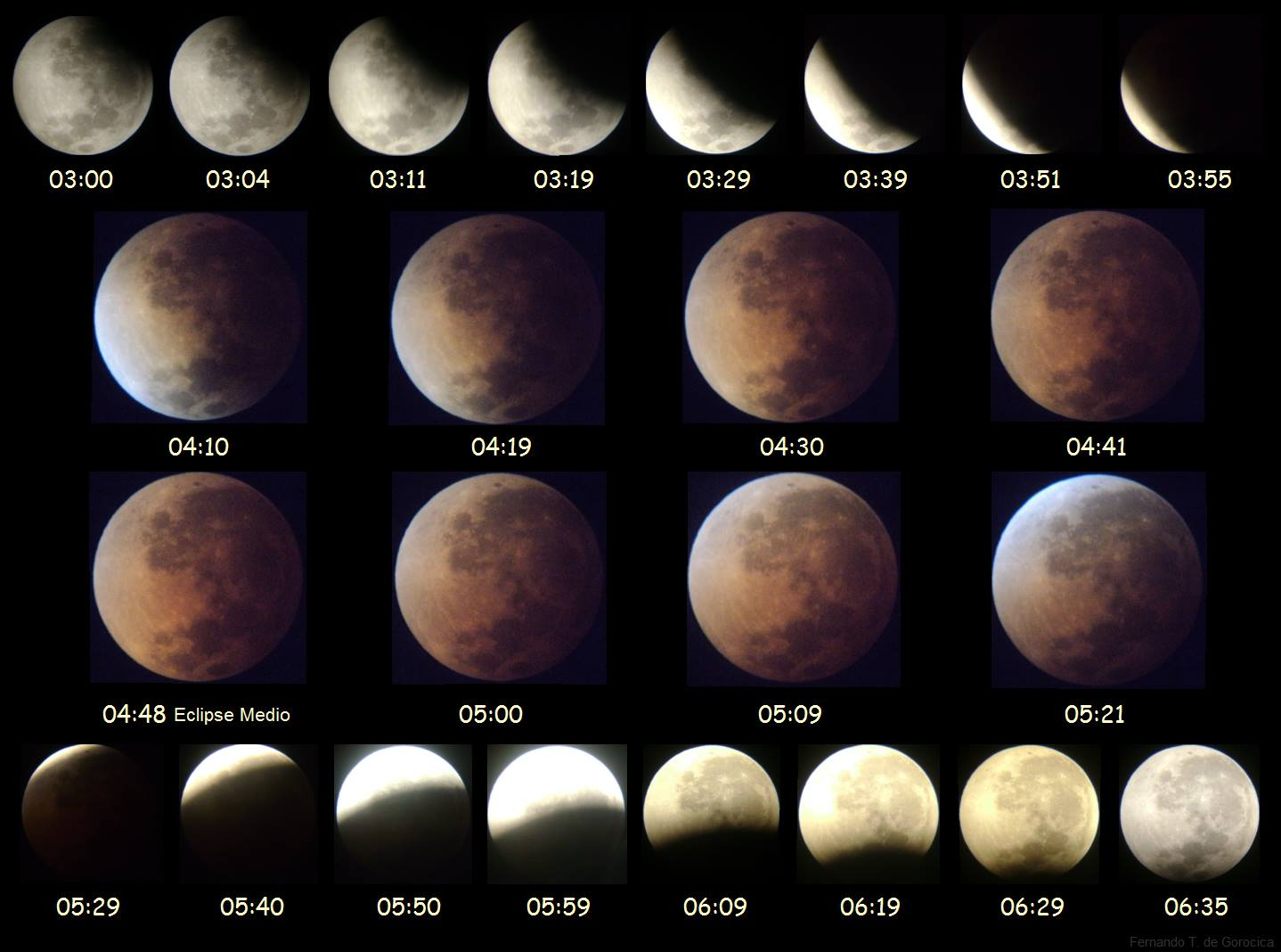 FASES ECLIPSE LUNAR TOTAL 15.04.2014. Mosaico con diferentes imágenes de las fases del eclipse lunar total y sus horarios desde el 1° contacto con la umbra, durante la totalidad y antes del último contacto. Ver vídeo. HORARIOS Y COORDENADAS HORIZONTALES (BUENOS AIRES – ARGENTINA). 1° contacto con la Umbra: 02:59 hs. Altura: 51°, Azimut: 122° (WNW). Comienzo de la Totalidad: 04:08 hs. Altura: 39°, Azimut: 107°. Eclipse Medio: 04:47 hs. Altura: 31°, Azimut: 100°. Fin de la Totalidad: 05:26 hs. Altura: 23°, Azimut: 94°. Último contacto con la Umbra: 06:35 hs. (crepúsculo Náutico) Altura: 10°, Azimut: 85°. Fotos con telescopio reflector Urano 100, espejo primario de 10 cms. y ocular de 18 mm (55 aumentos). Cámara digital Sony CyberShot DSC-S700. 7,2 Mpx. Automática y 10 segundos disparador. Cámara digital Sony SteadyShot DSC-W310. 12,1 Mpx. Automática y 10 segundos disparador. En la Totalidad del Eclipse. ISO 3200. EV: 1,0 (+) brillo. Software: MS-Office Picture Manager (sólo recortar). © Lic. Fernando T. de Gorocica. — en Ciudad Jardín Lomas del Palomar.